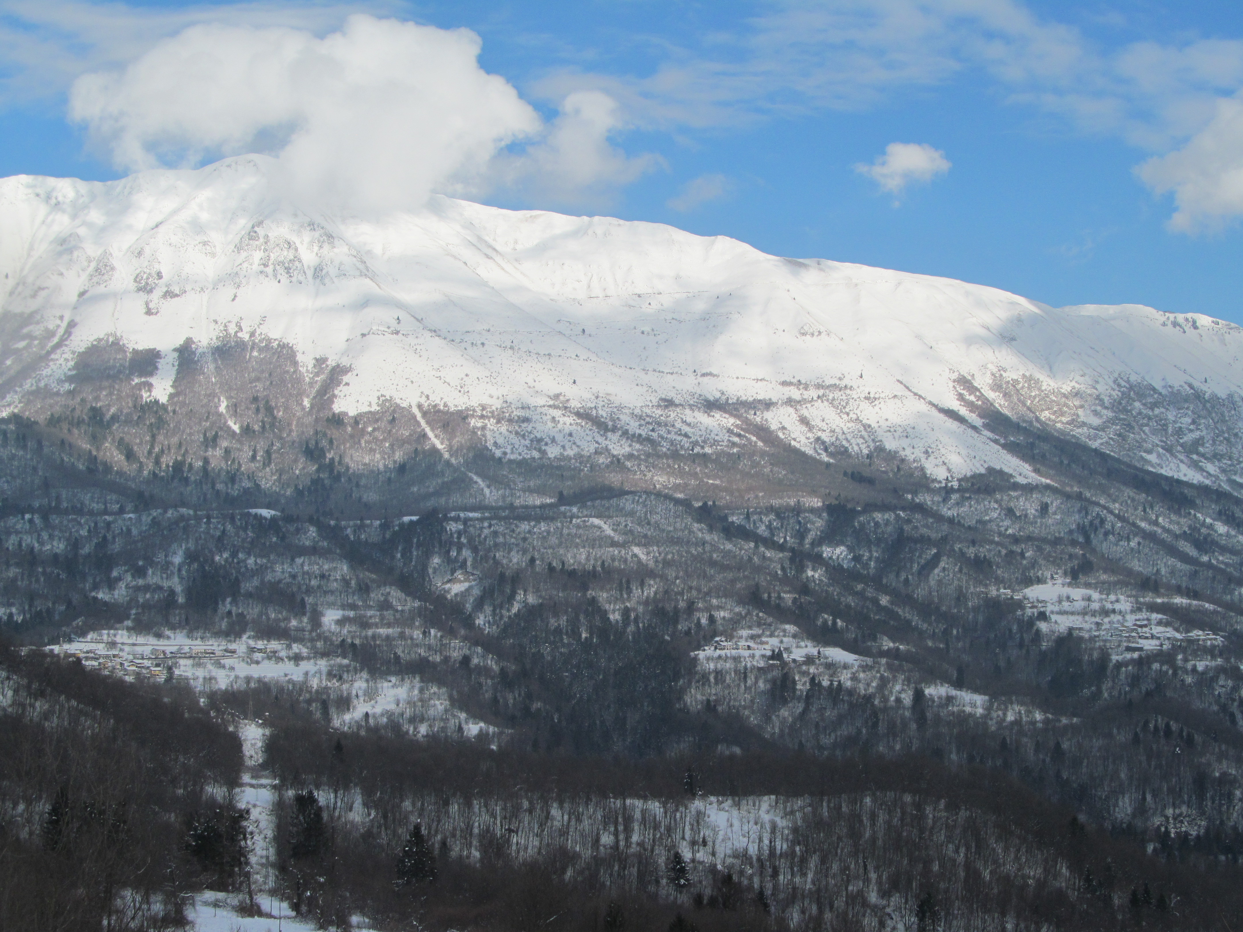 Breginjski kot zgoraj Stol.